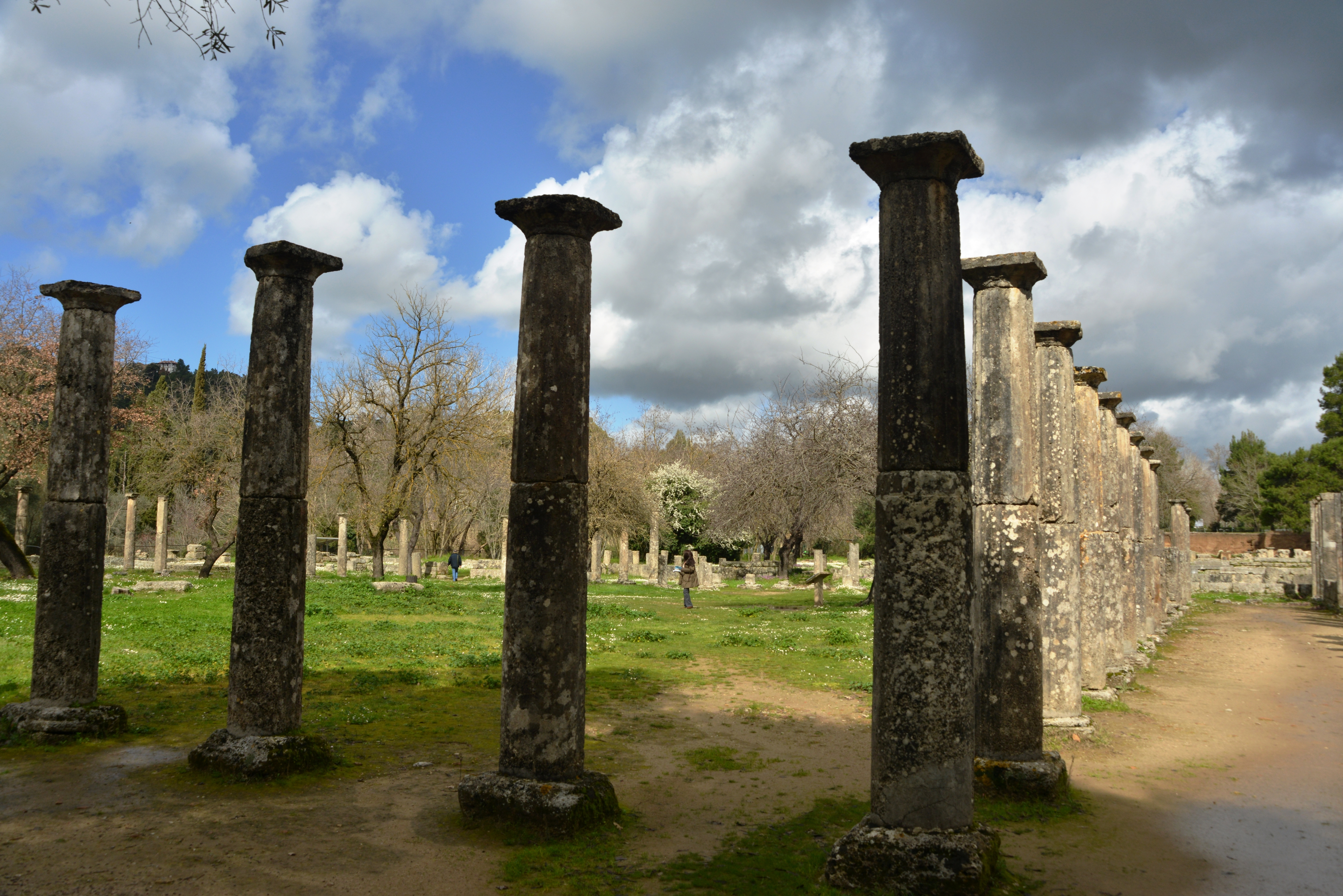 Παλαίστρα Ολυμπίας«Παλαίστρα Ολυμπίας»